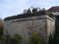 Hohentübingen - Blick vom Schänzle zur Westbastion